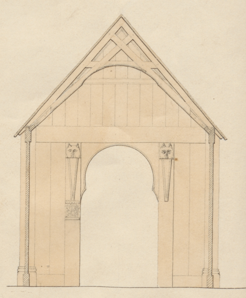 Bildet er hentet fra Riksantikvaren. plan og snitt Eier : Fortidsminneforeningen Sted : Norway, Buskerud, Rollag Emneord: STAVKIRKER, TEGNINGER (DOKUMENTASJON), ARKITEKTURTEGNINGER, PLANTEGNINGER, SNITTEGNINGER Medium : Tusj